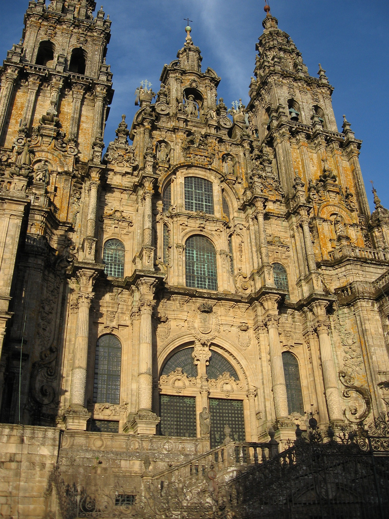 Fachada de la Catedral de Santiago de Compostela""